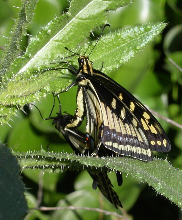 Anise Swallowtails (Papilio zelicaon) mating